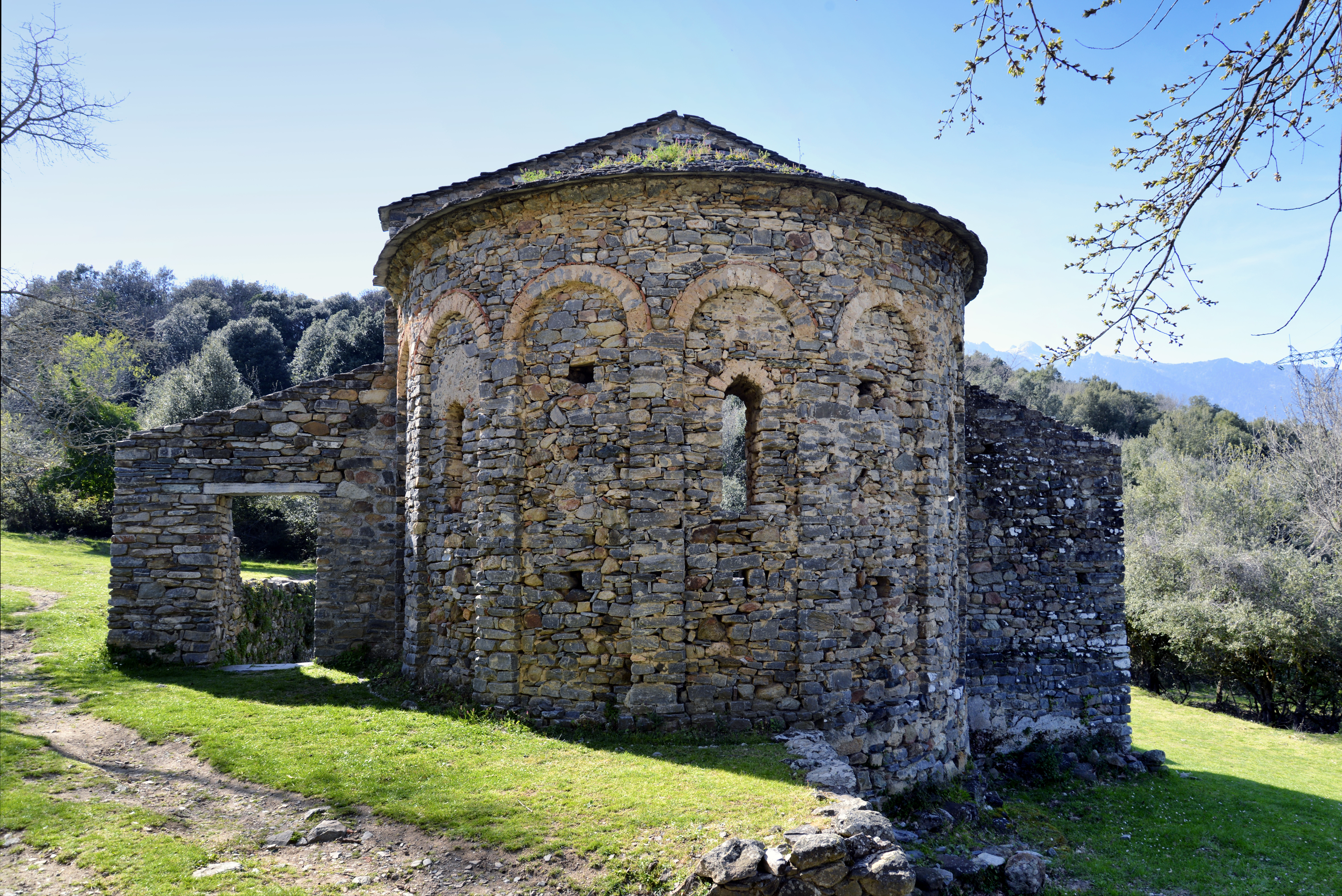 Corte, Centre Corse - Chevet de l'église préromane San Giovanni Battista du IXe siècle. .